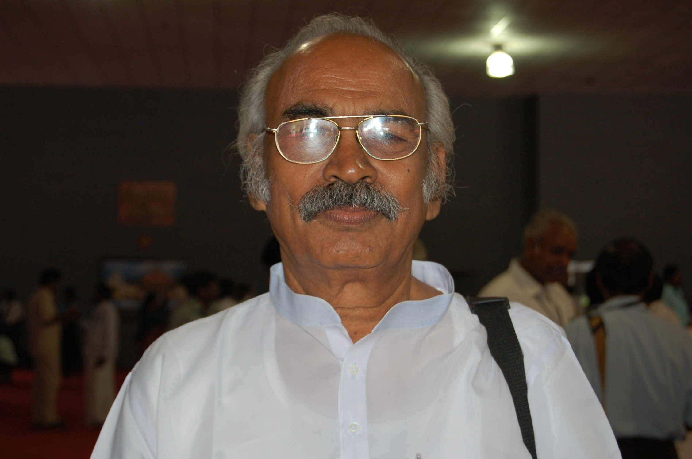 சாகித்திய அக்காதெமி விருது பெற்ற எழுத்தாளர் பொன்னீலன். கோவையில் நடந்த செம்மொழி மாநாட்டில் சந்தித்தபொழுது எடுத்தபடம்.